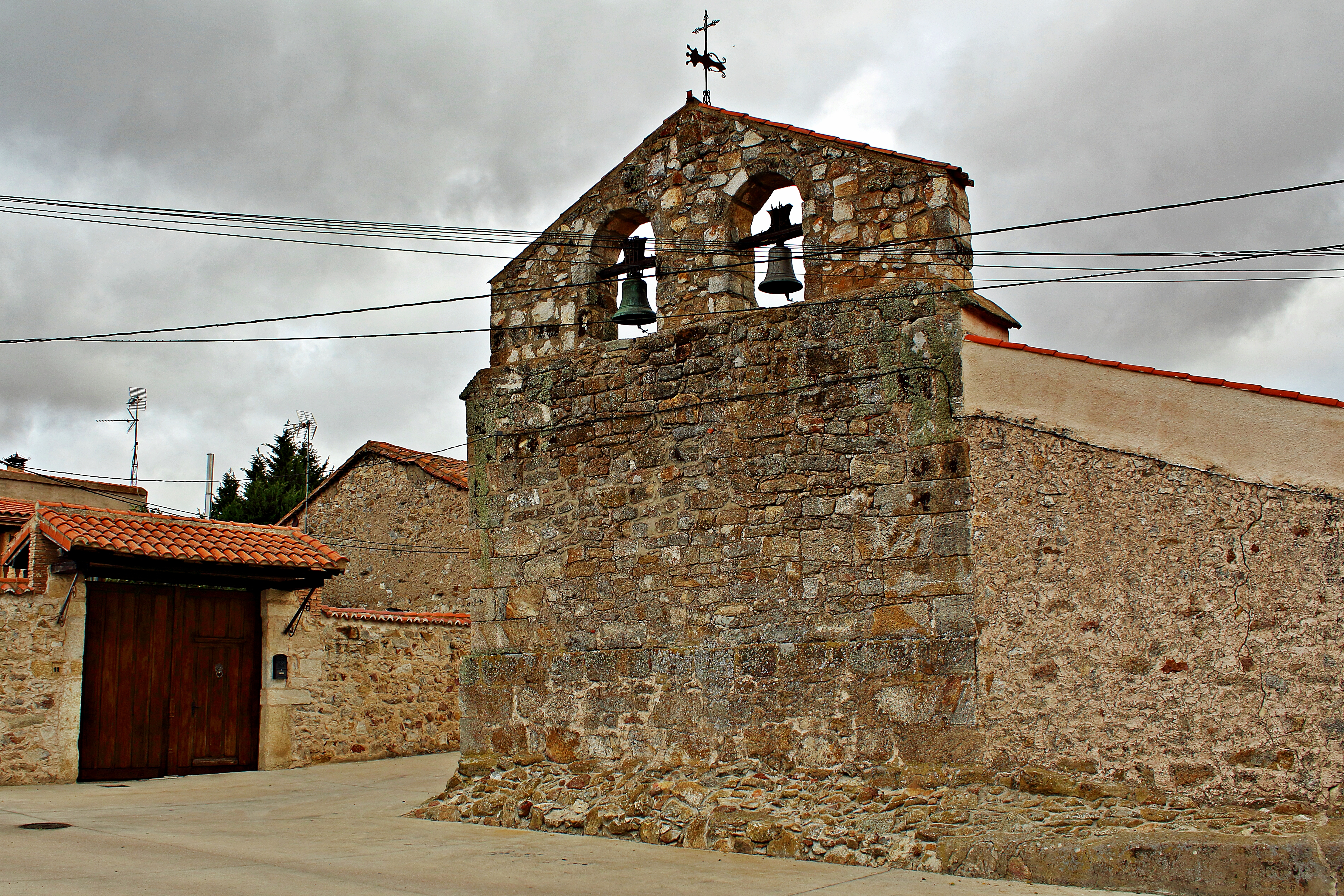 El Arco municipio de Salamanca, comarca Tierra de Ledesma, provincia de Salamanca.